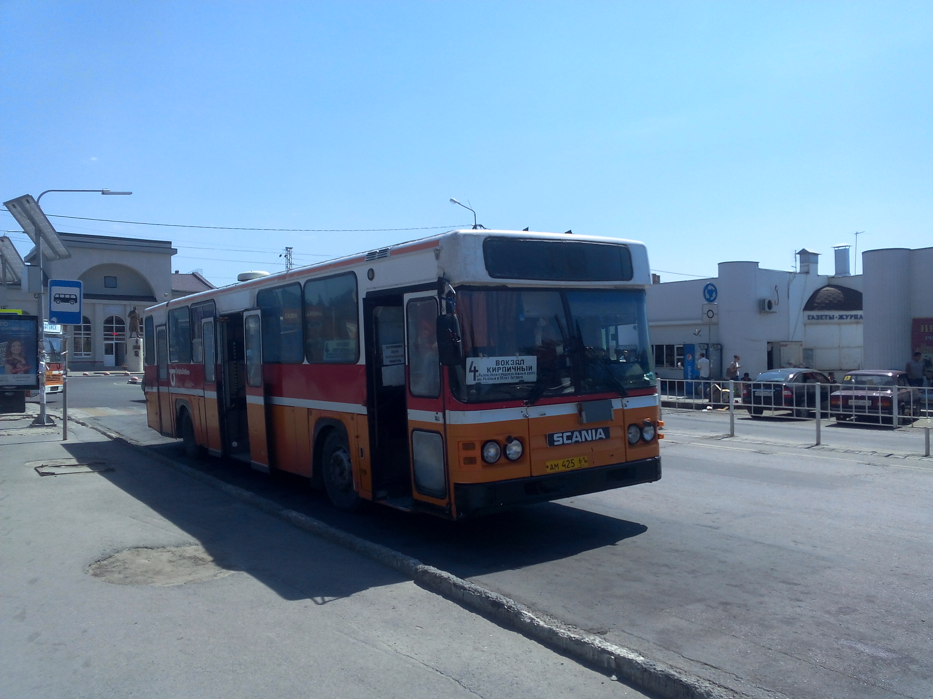 г. Батайск, ж.д. вокзал, автобус маршрута №4